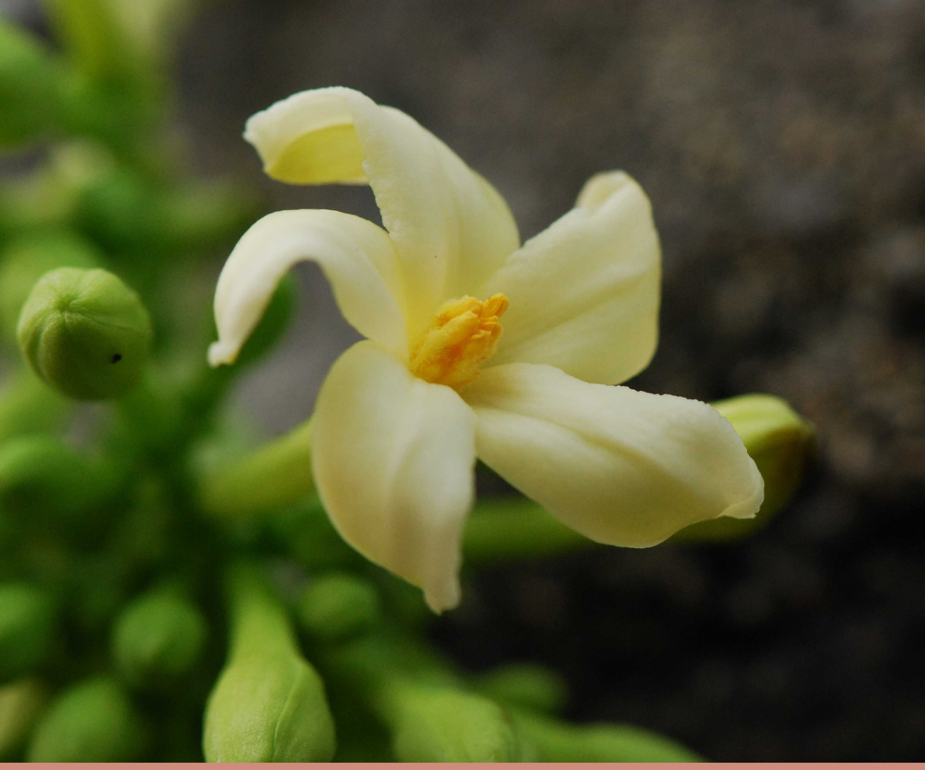 Carica papaya, papayer, fleur mâle, Ile Maurice